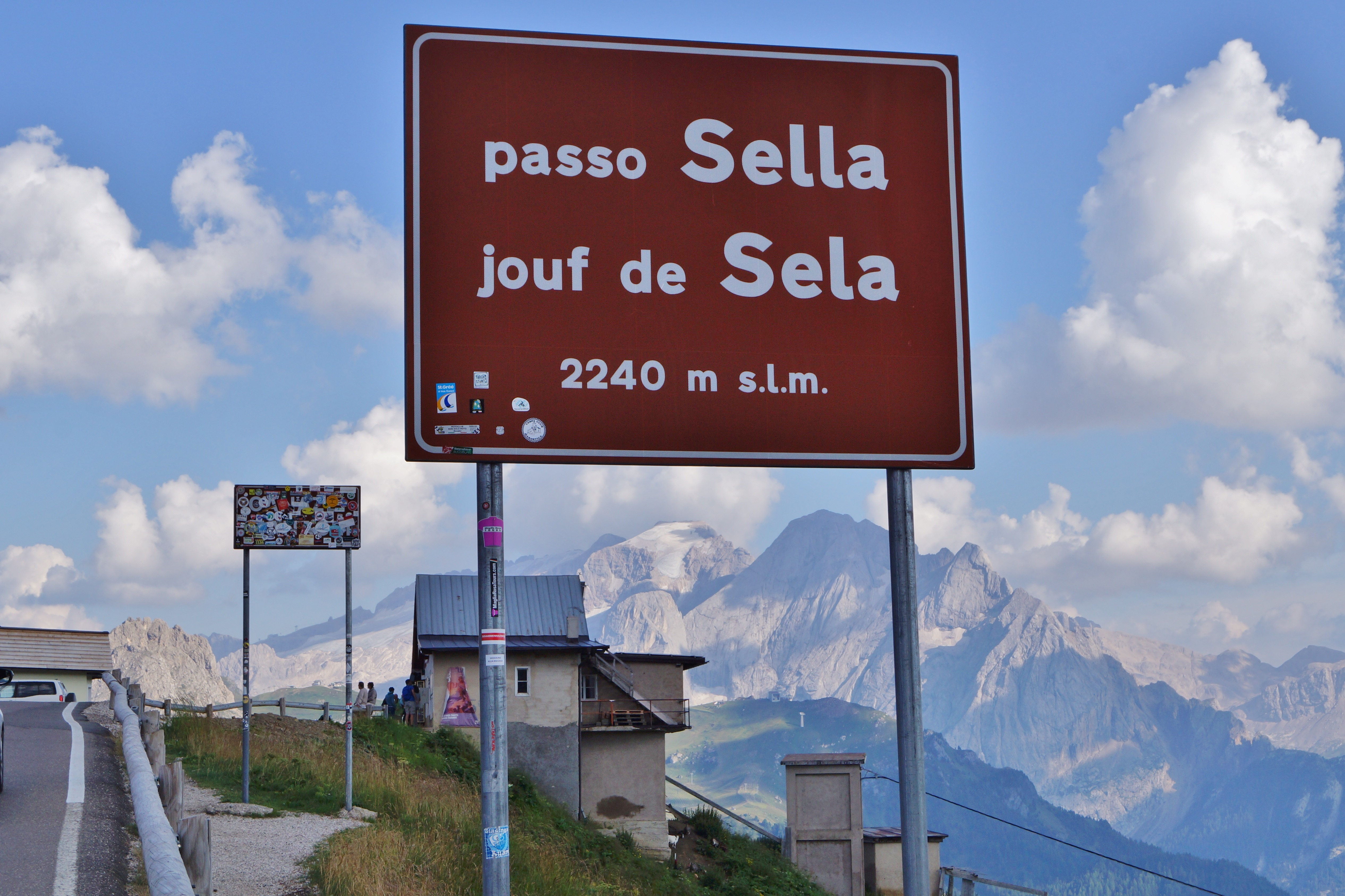 Schild auf der Passhöhe des Sellajochs mit Blick zur Marmolata